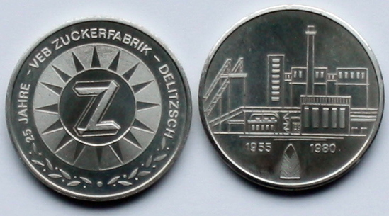 Medaille 25 Jahre VEB Zuckerfabrik-Delitzsch 1955-1980 23,8g Durchmesser ca 36mm Höhe ca. 3mm